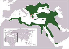 מפה של האמפריה העת'מאנית בשיאה, עם הדגשה סביב שטח יוון, נלקח מהמפה בערך האימפריה העות'מאנית, ושנה על ידי